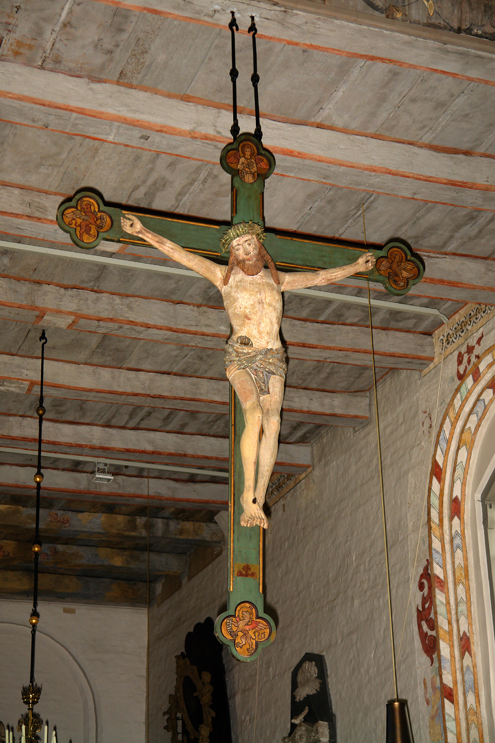 Kirche St. Lorenz (17.Jh.) in Lübeck-Travemünde: Triumphkreuz, spätgotischer Corpus aus dem letzten Viertel des 15. Jahrhundert, sein Brettkreuz mit gemalten Evangelistensymbolen aus dem Vorgängerbau (16.Jh.)